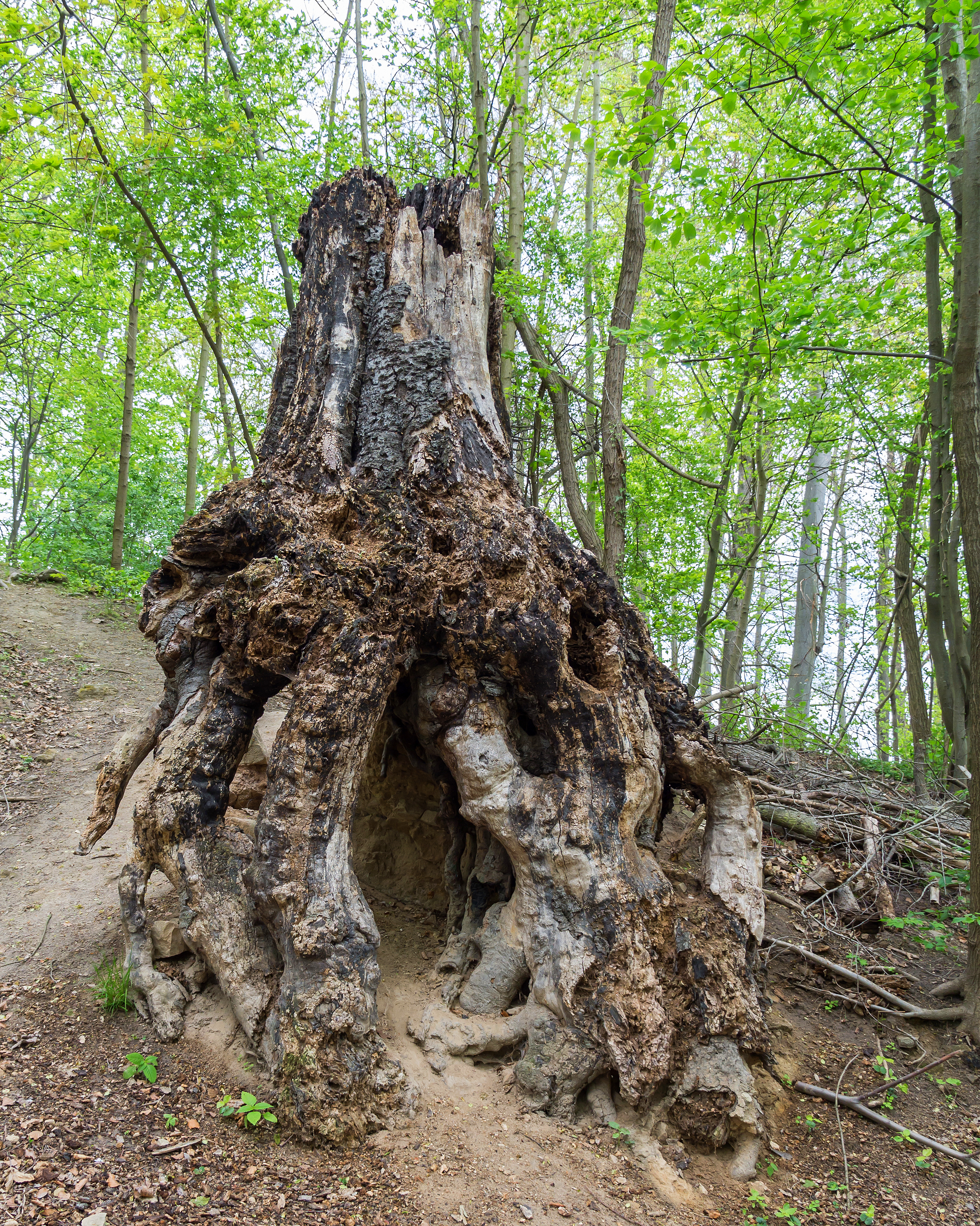 Wurzelburg Rudolstadt II Naturdenkmal DE-TH